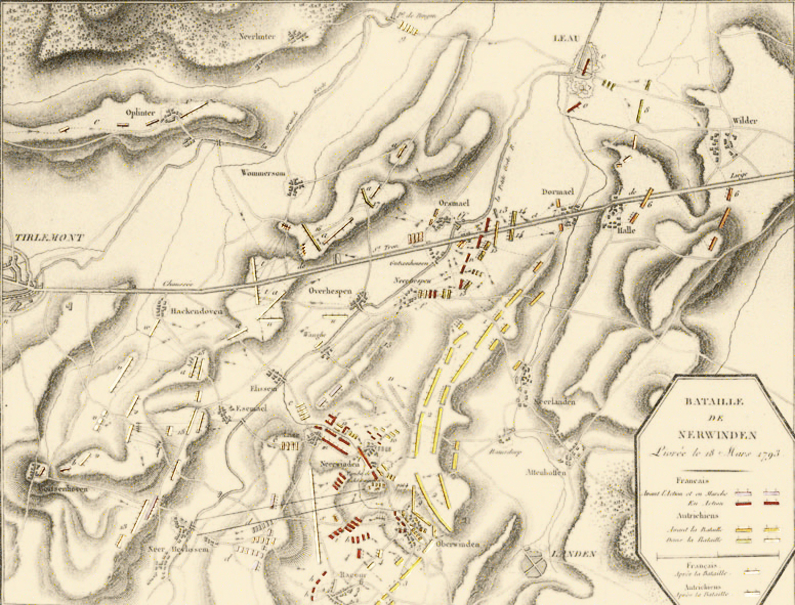 Plan der Schlacht von Neerwinden im Jahr 1793